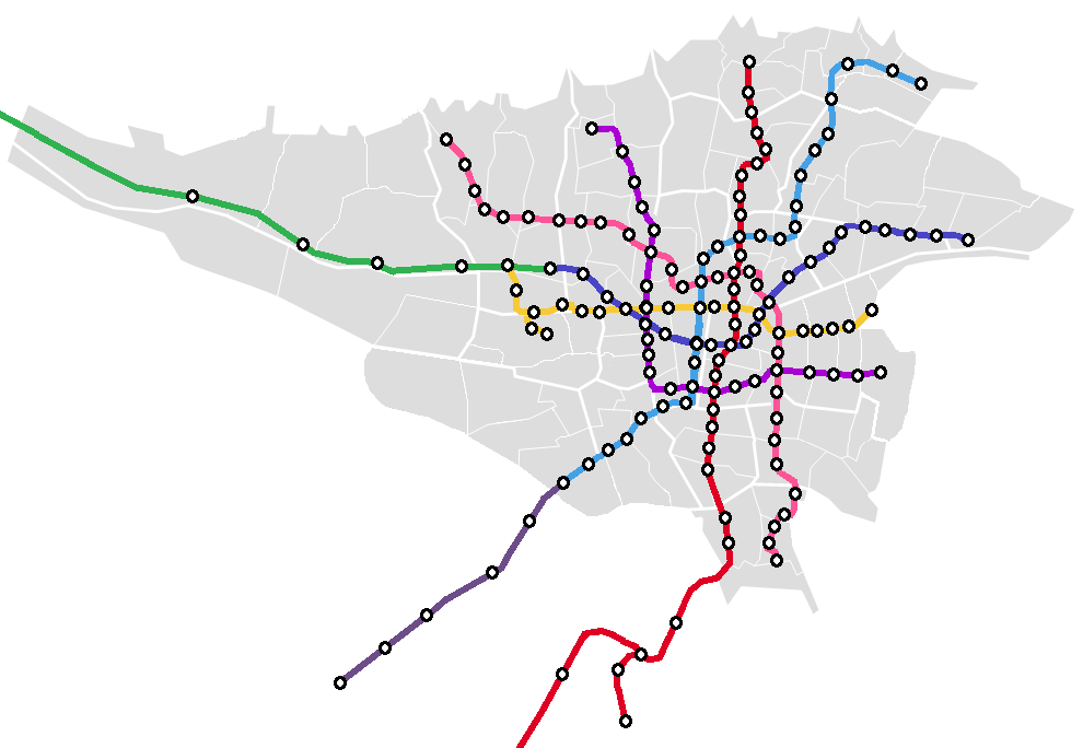 نقشه جغرافیایی مترو تهران و مناطق شهرداری تهران